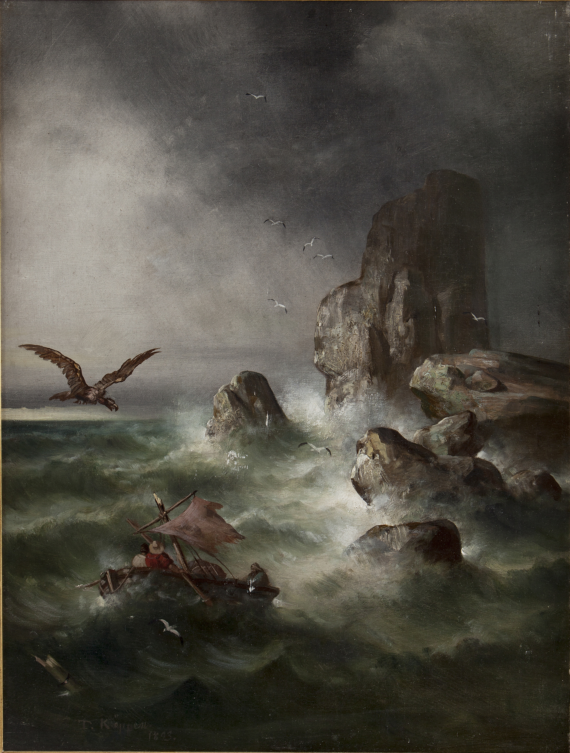 Seenot